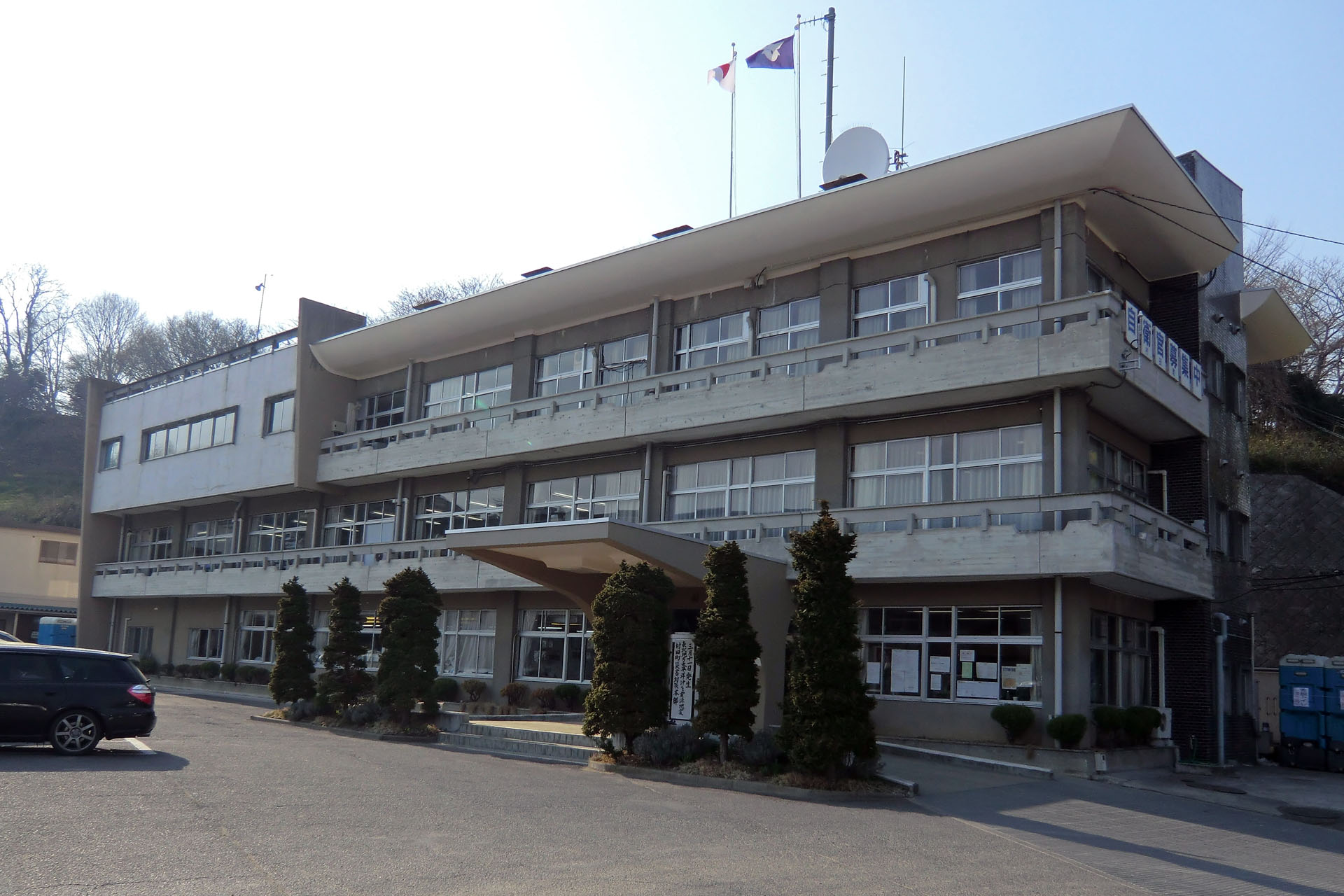 村田町役場